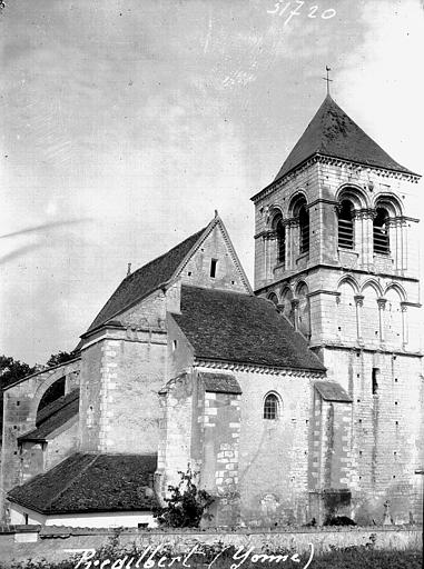 Prégilbert église photo de Auguste Louzier Sainte-Anne